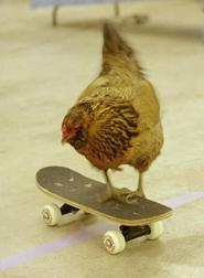 Chicken on skateboard.